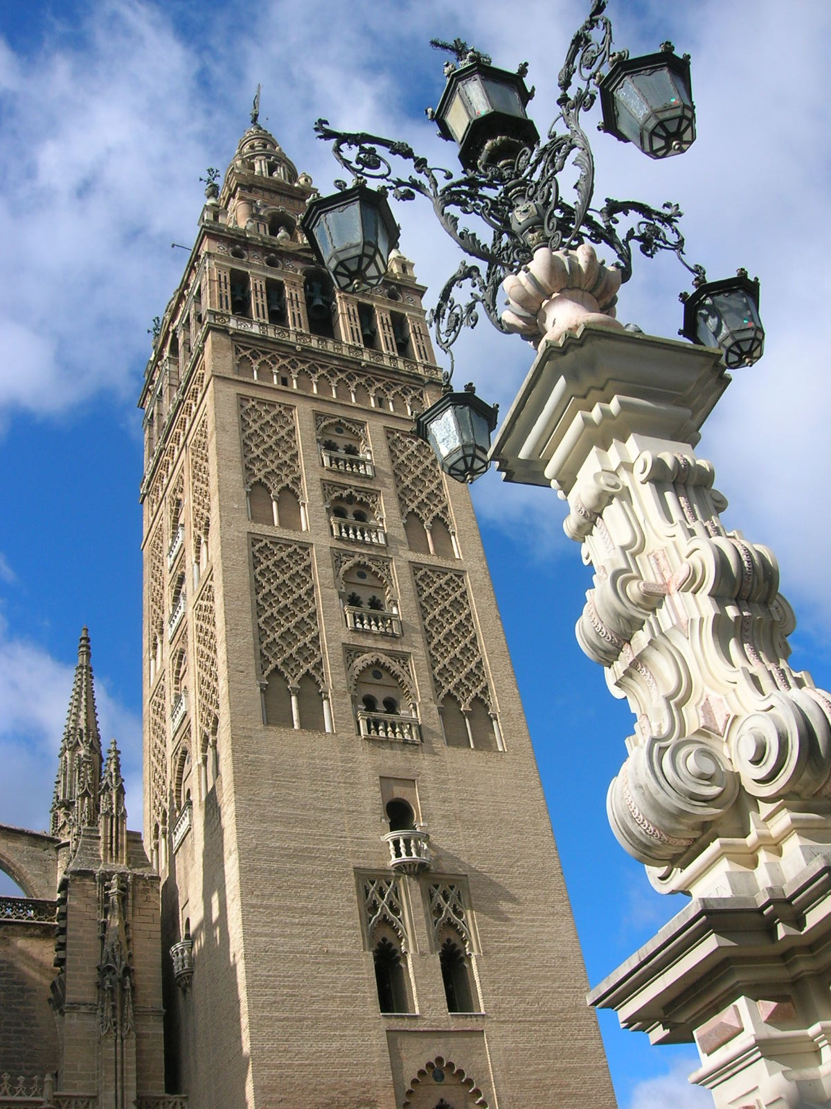 Particolare della cattedrale di Siviglia.